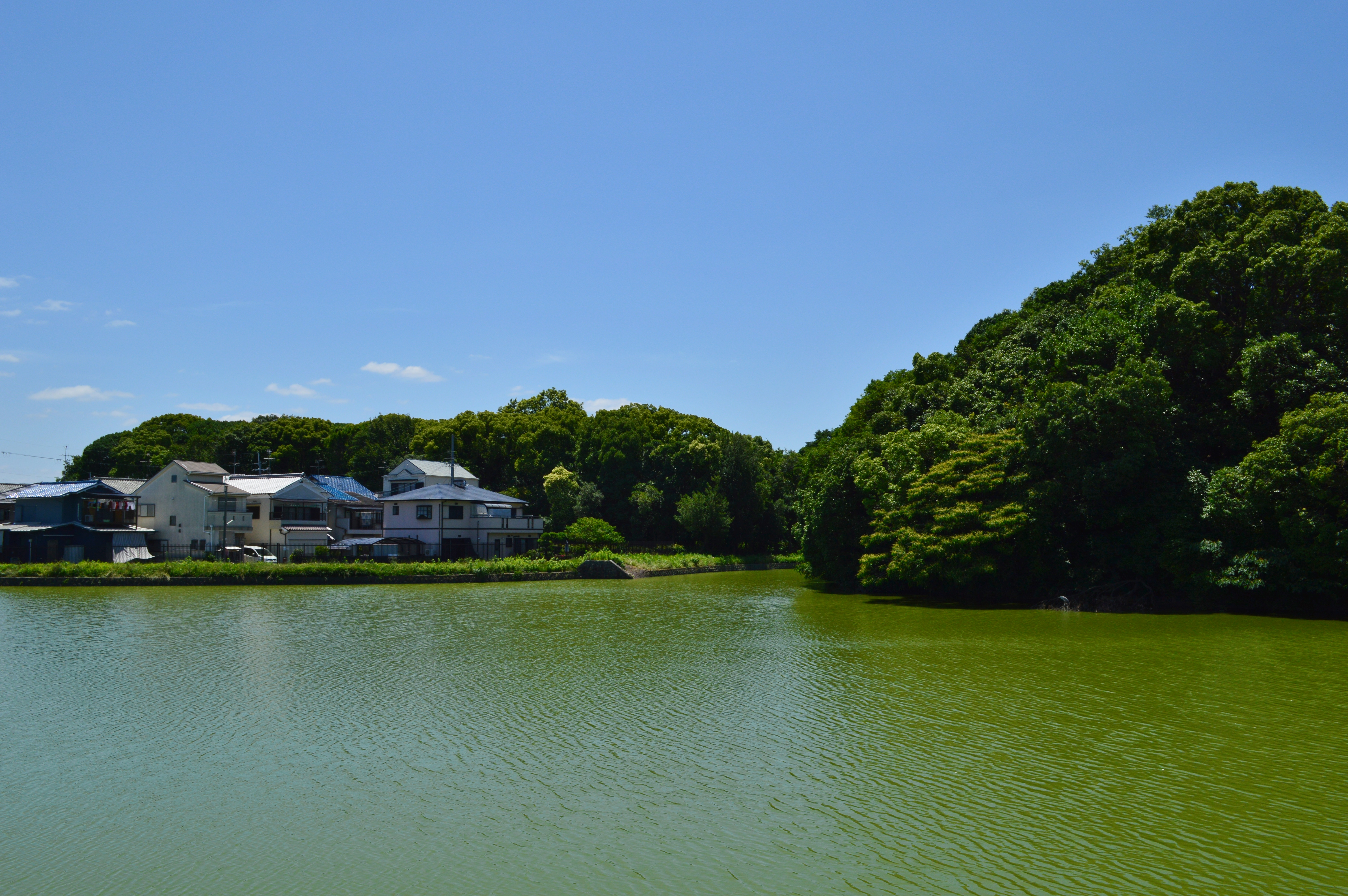 島泉丸山古墳と島泉平塚古墳